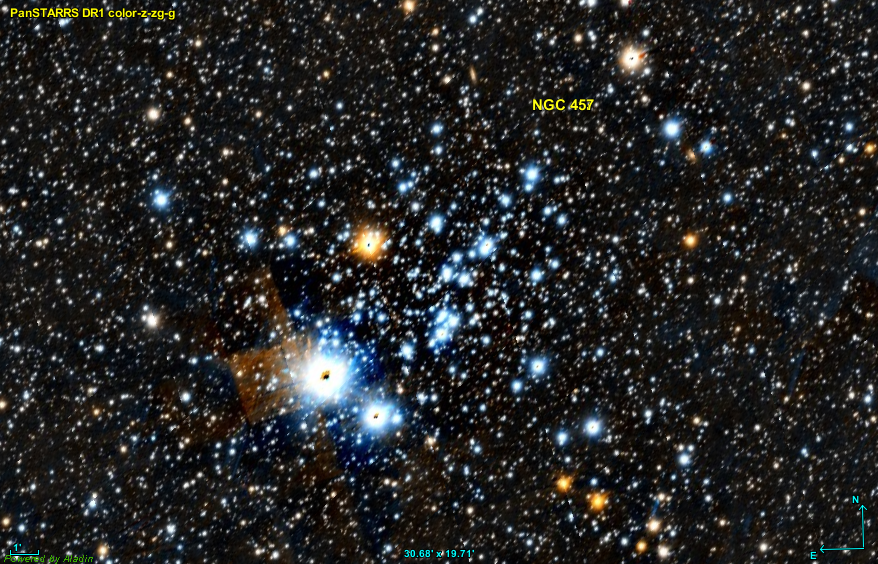 Image créée à l'aide du logiciel Aladin Sky Atlas du Centre de Données astronomiques de Strasbourg et des données publiques en format FIT de Pan-STARRS ([ Panoramic Survey Telescope And Rapid Response System).